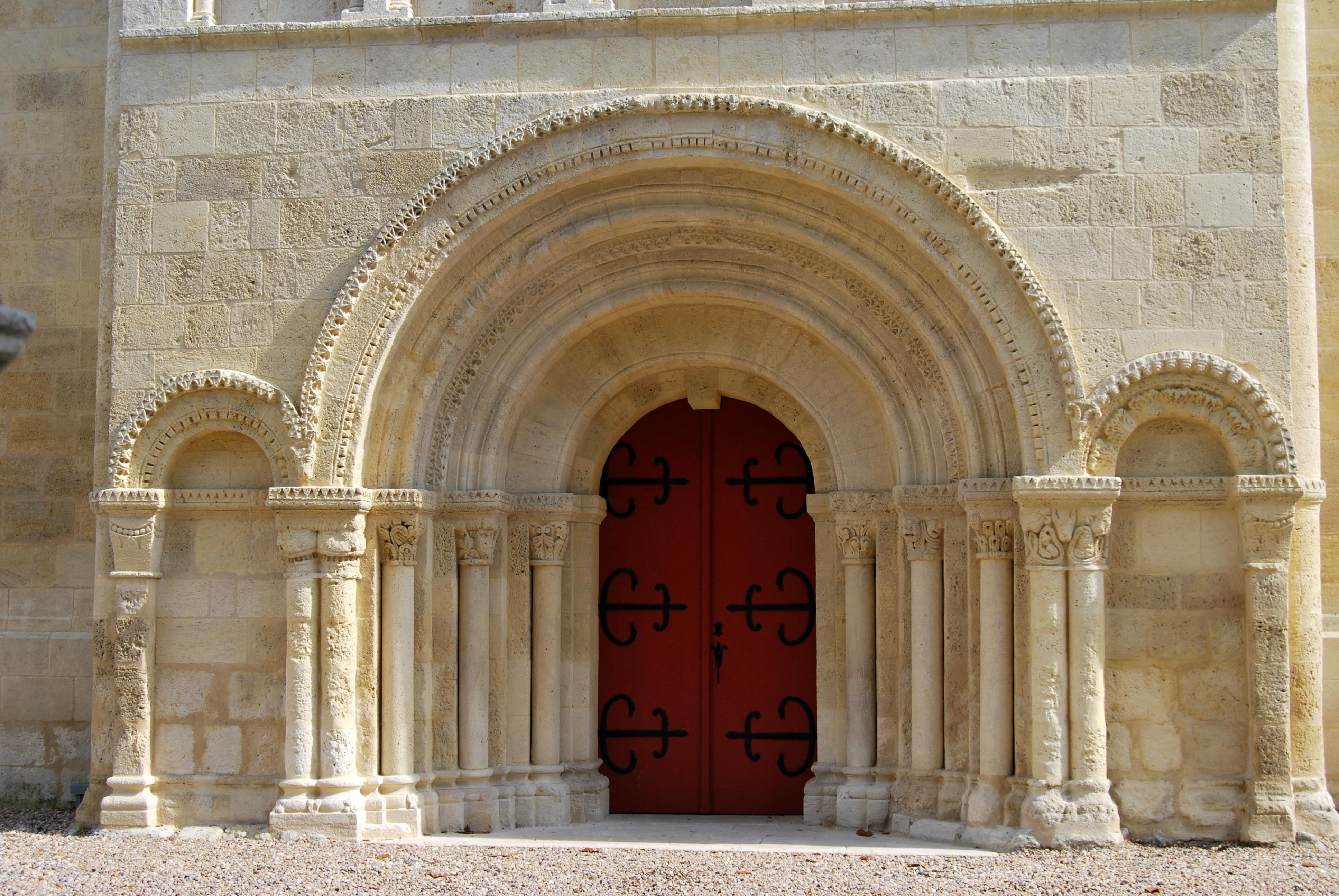 Église Saint-Martin d'Izon .